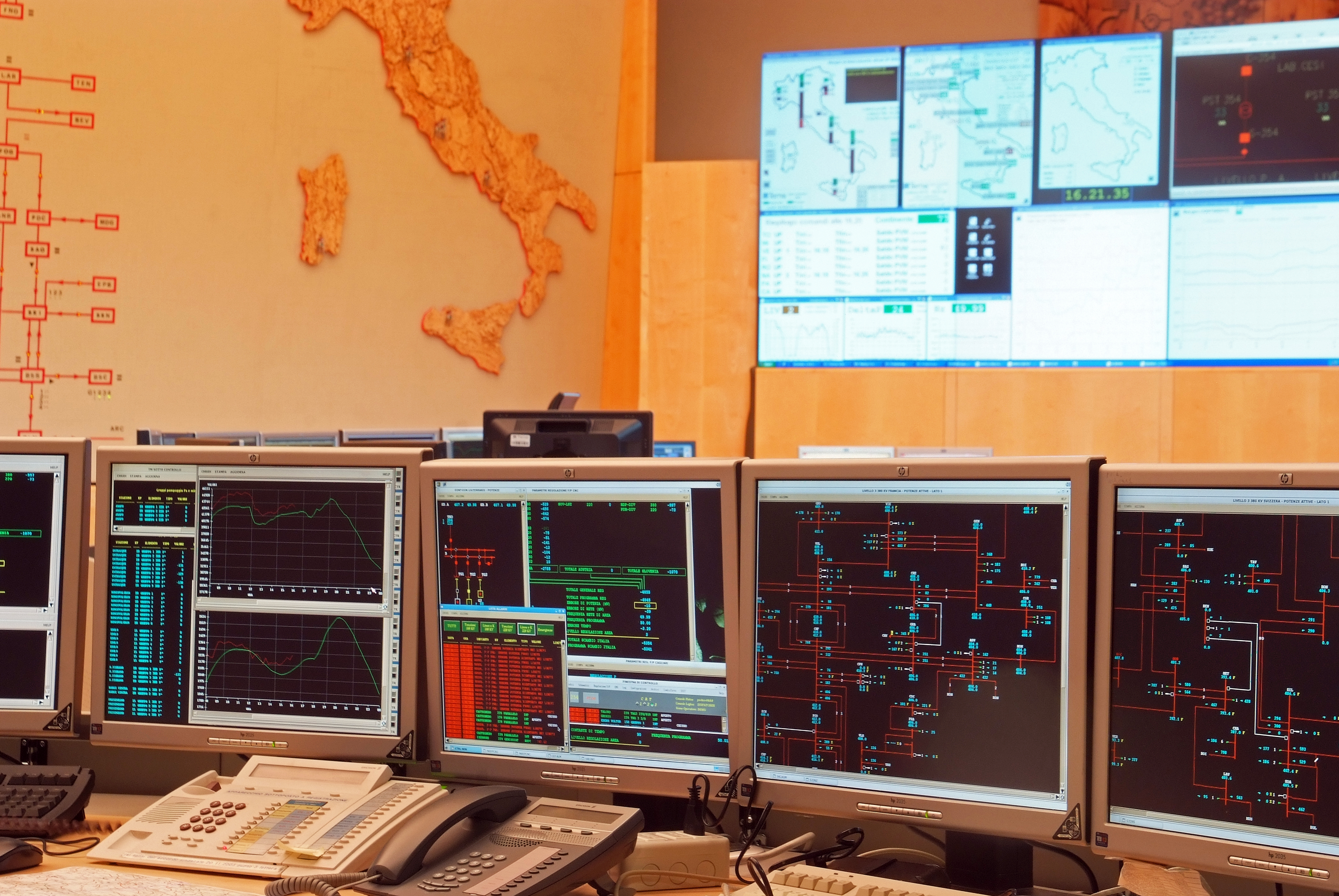 Dispacciamento - Sala controllo; Centro Nazionale di Controllo (CNC) di Terna